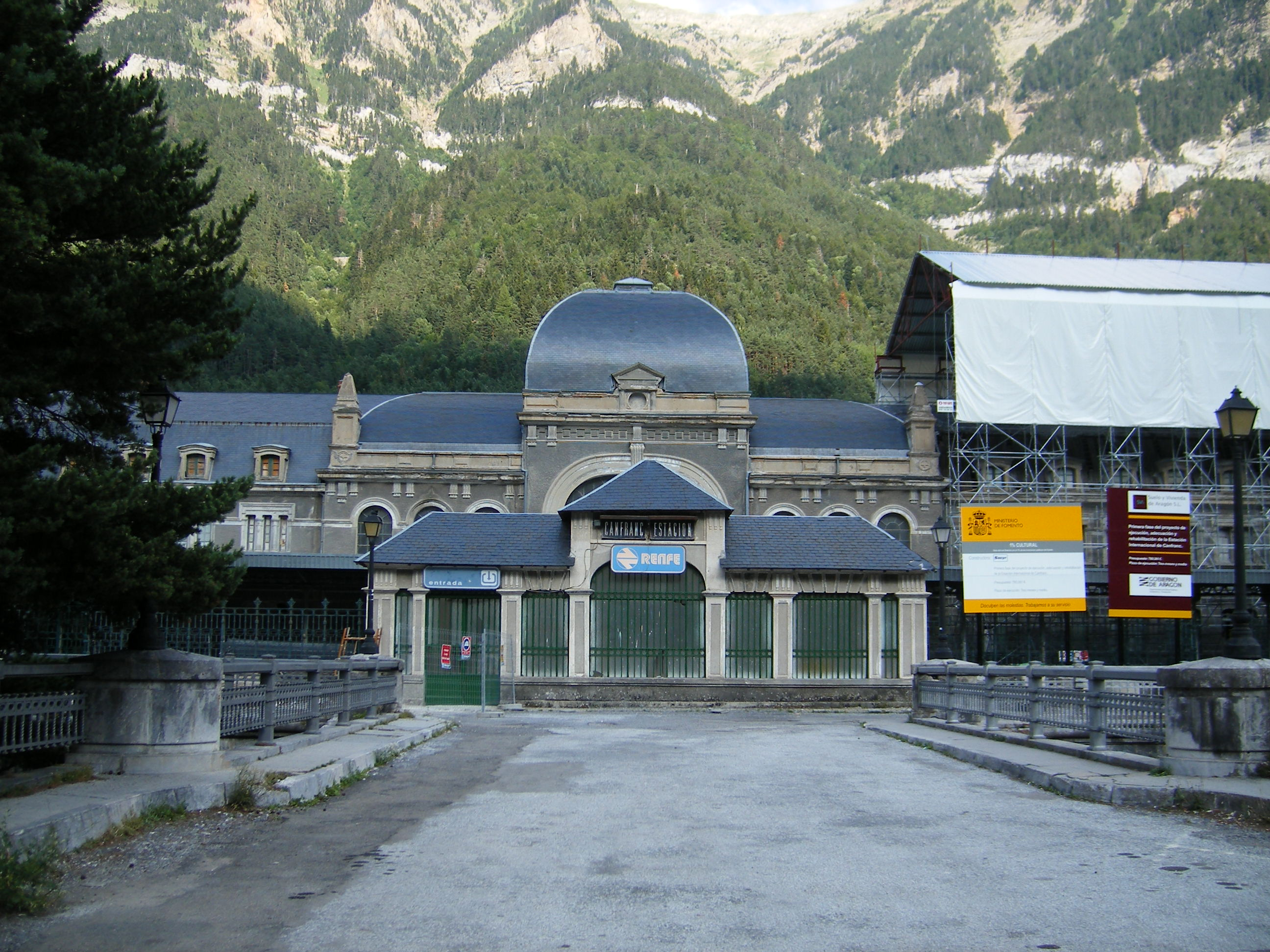 Aragonés: Estazión Internazional de Canfrán.